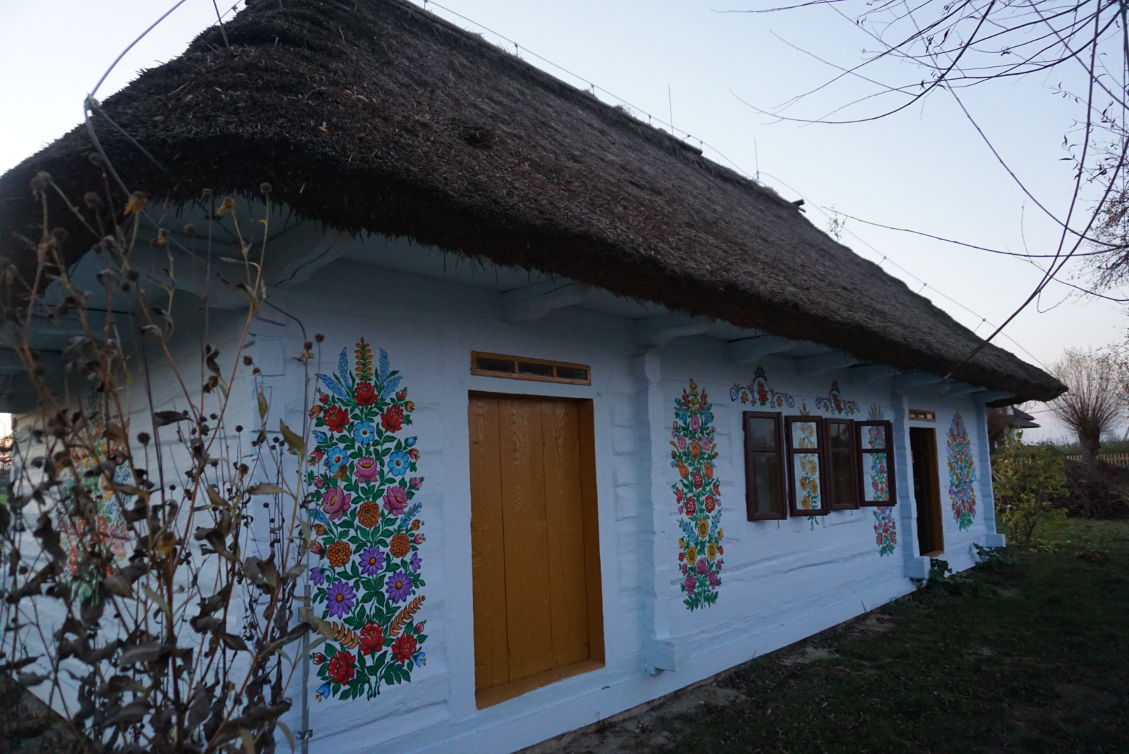 décoration sur une vieille maison à Zalipie